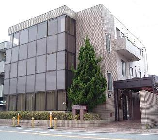 ISAビル